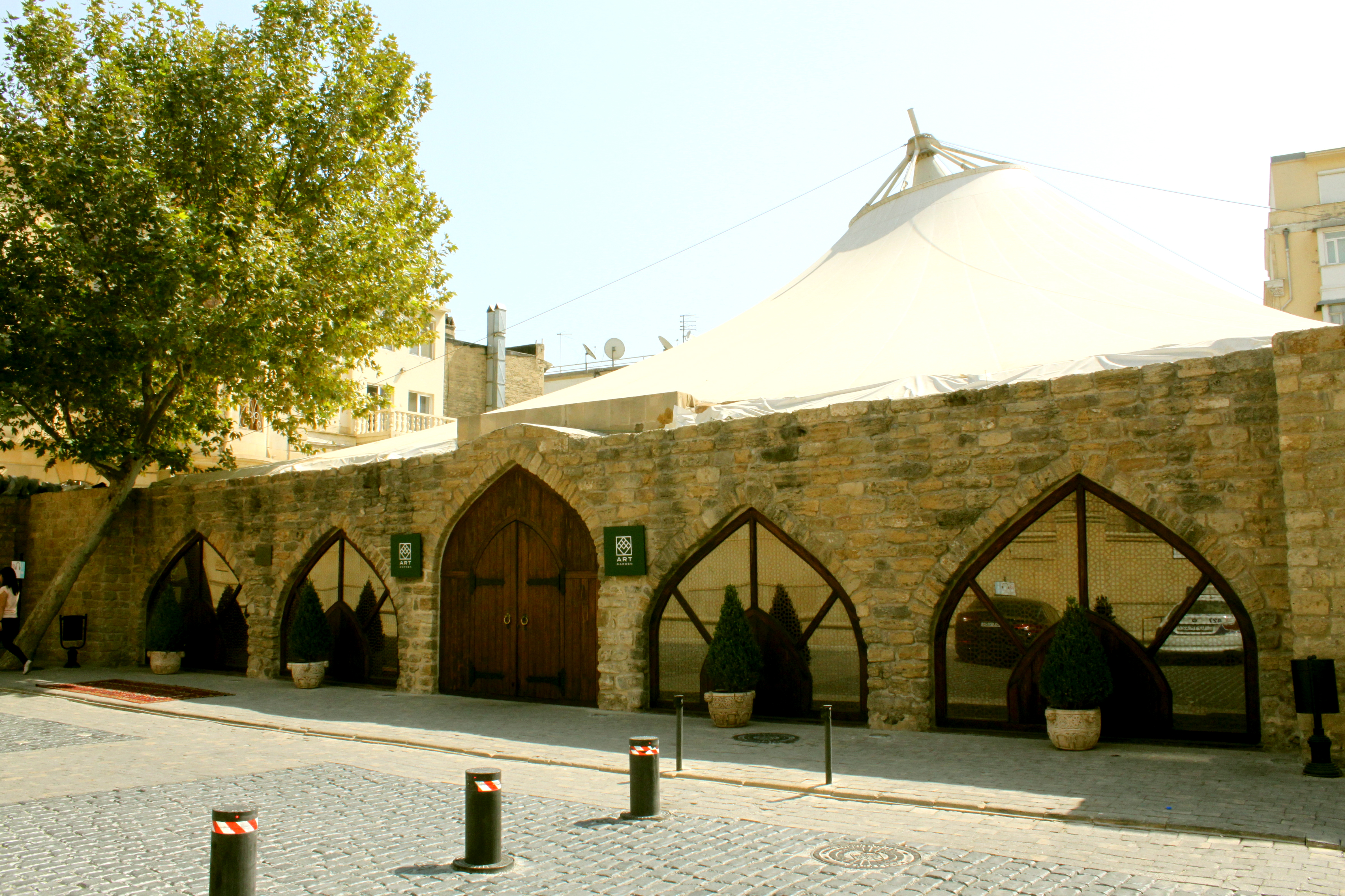 Xan karvansarayı